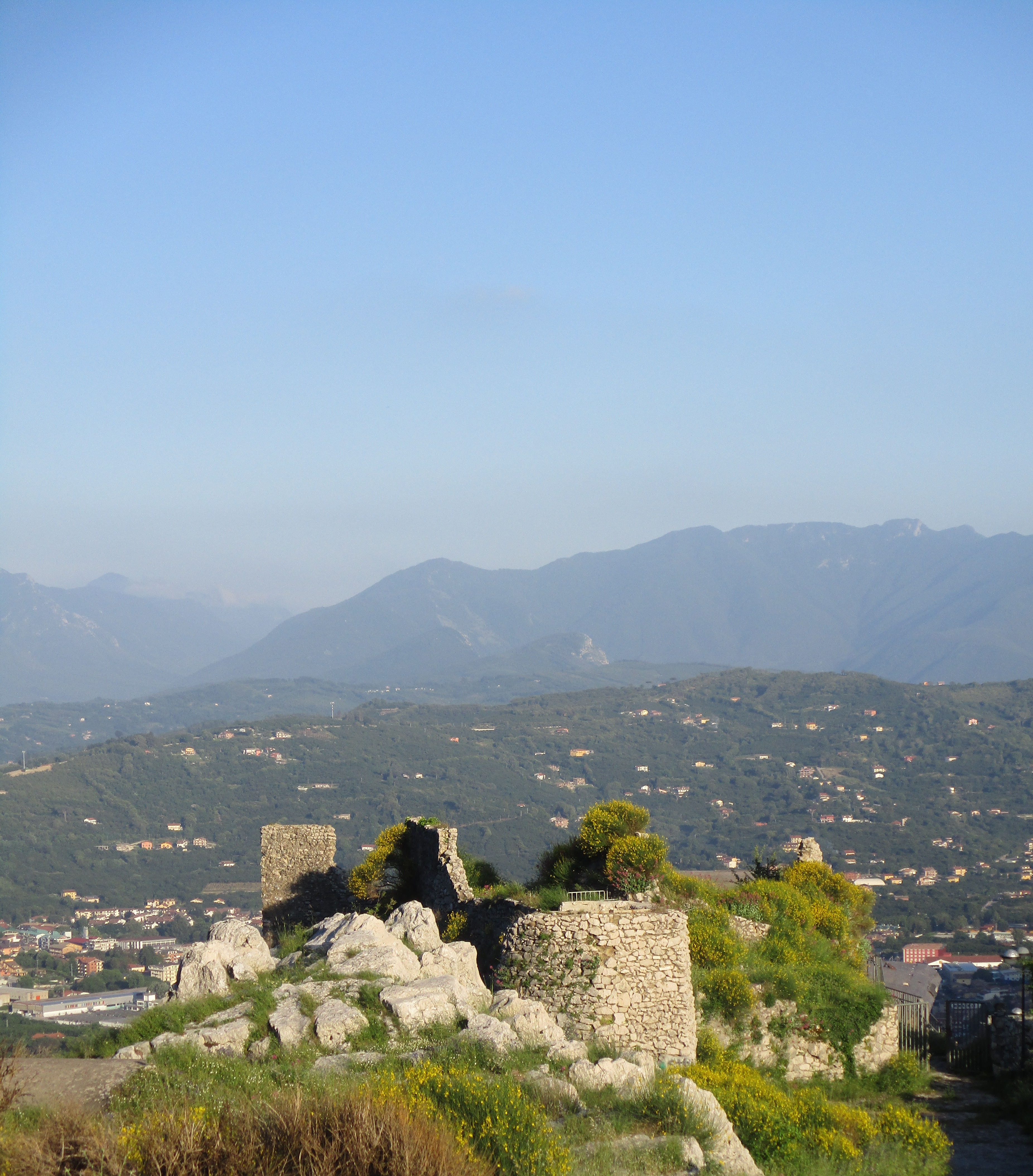 Vista del castello di Mercogliano (AV)